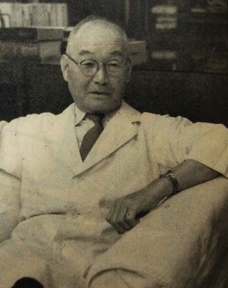 長尾勝